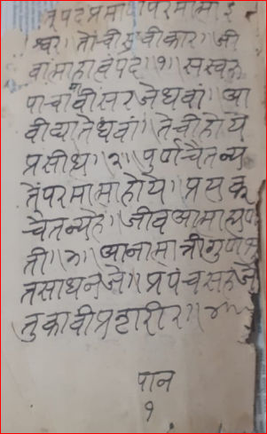 तत्वमसि पान 1